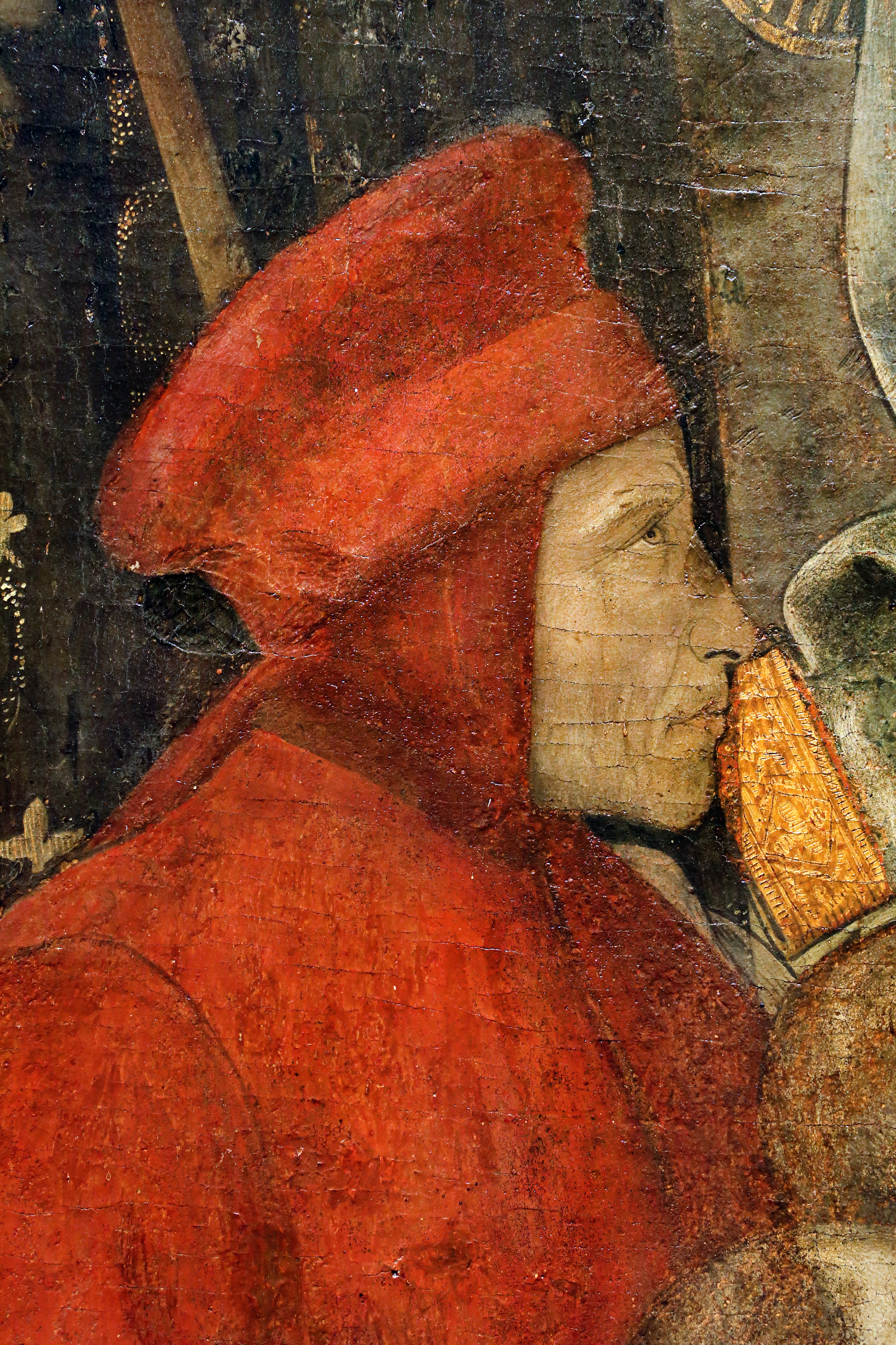 Museo civico (Prato) This is a photo of a monument which is part of cultural heritage of Italy.